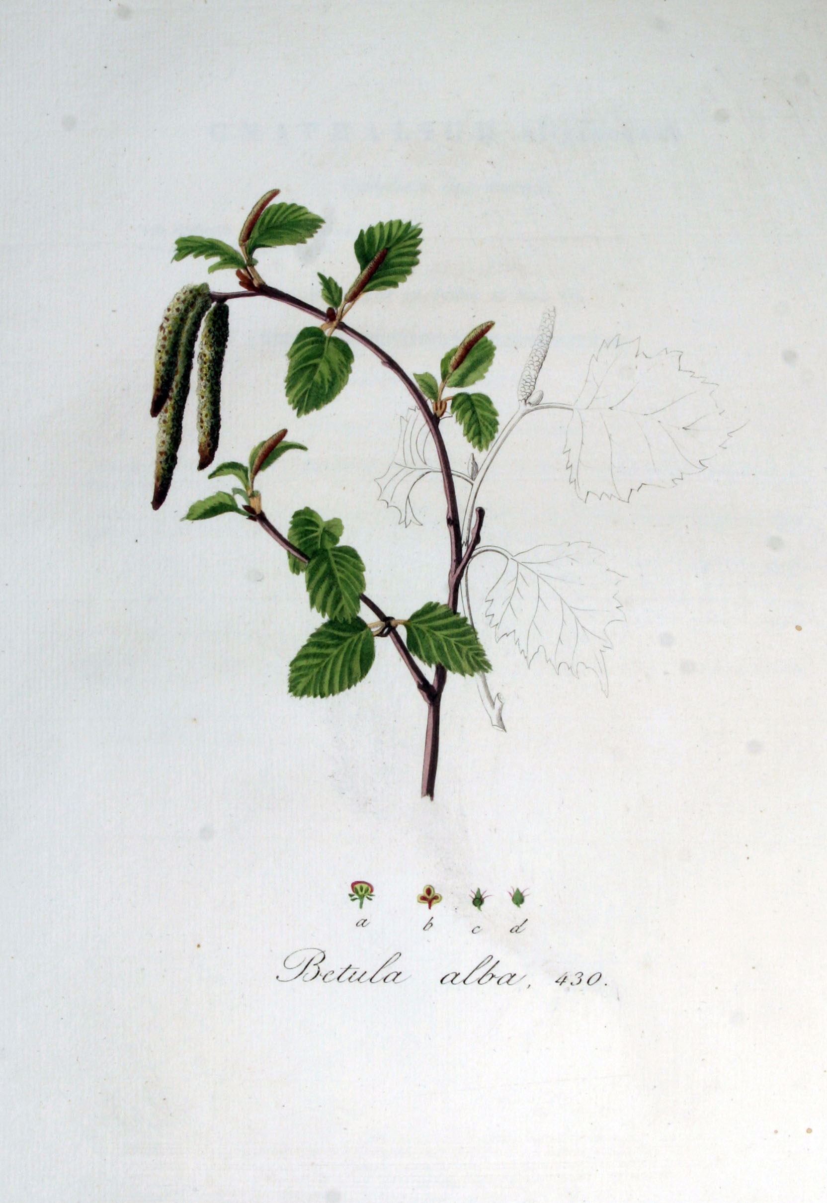 Betula alba L. (nom. rejic.) This image is possible for both: Betula pubescens Ehrh., 1791 (var. pubescens) or Betula pendula Roth, 1788